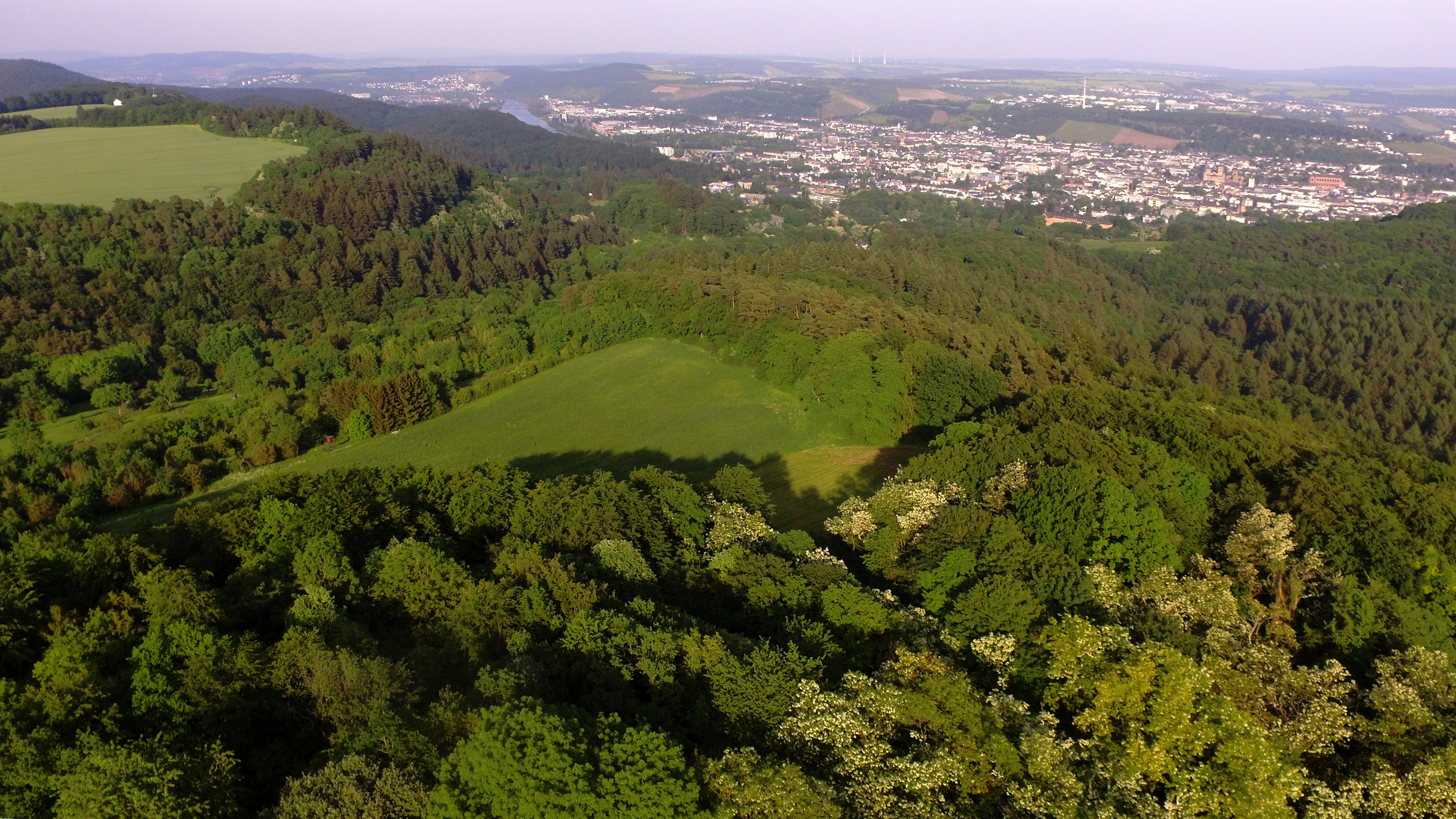 Trierː Naturschutzgebiet Gillenbachtal - Blick von NW auf den unteren Teil des Naturschutzgebiets. Im Hintergrund die Stadt Trier